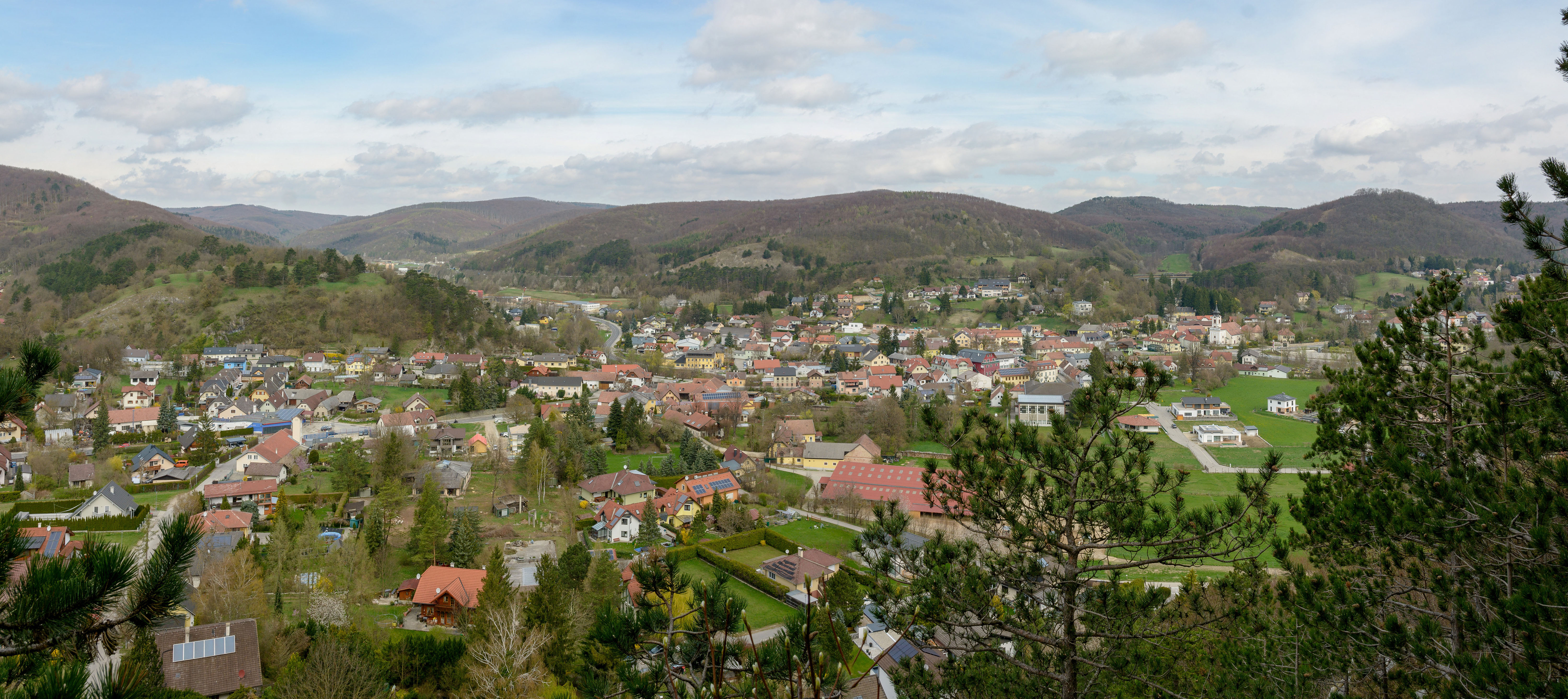 Alland